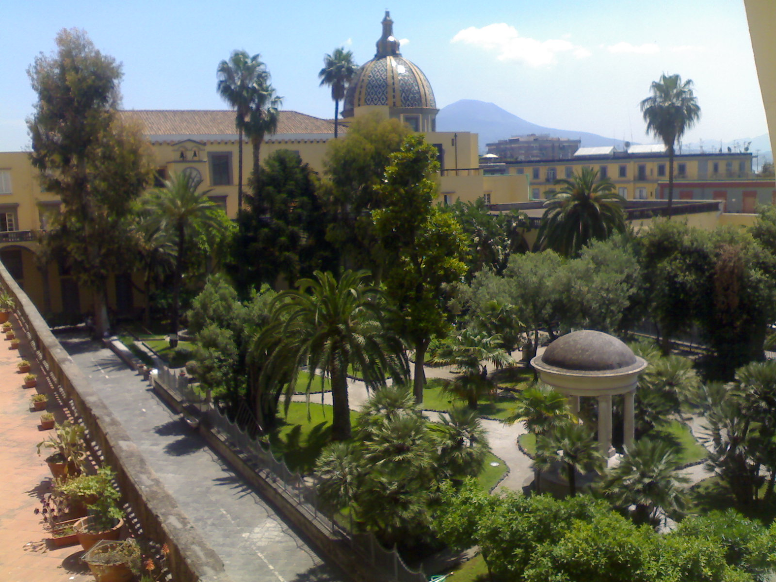 Chiostro dei Santi Marcellino e Festo (Napoli)